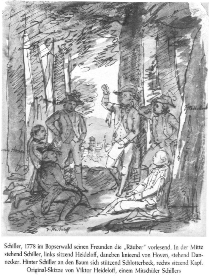 Siehe Bildunterschrift.